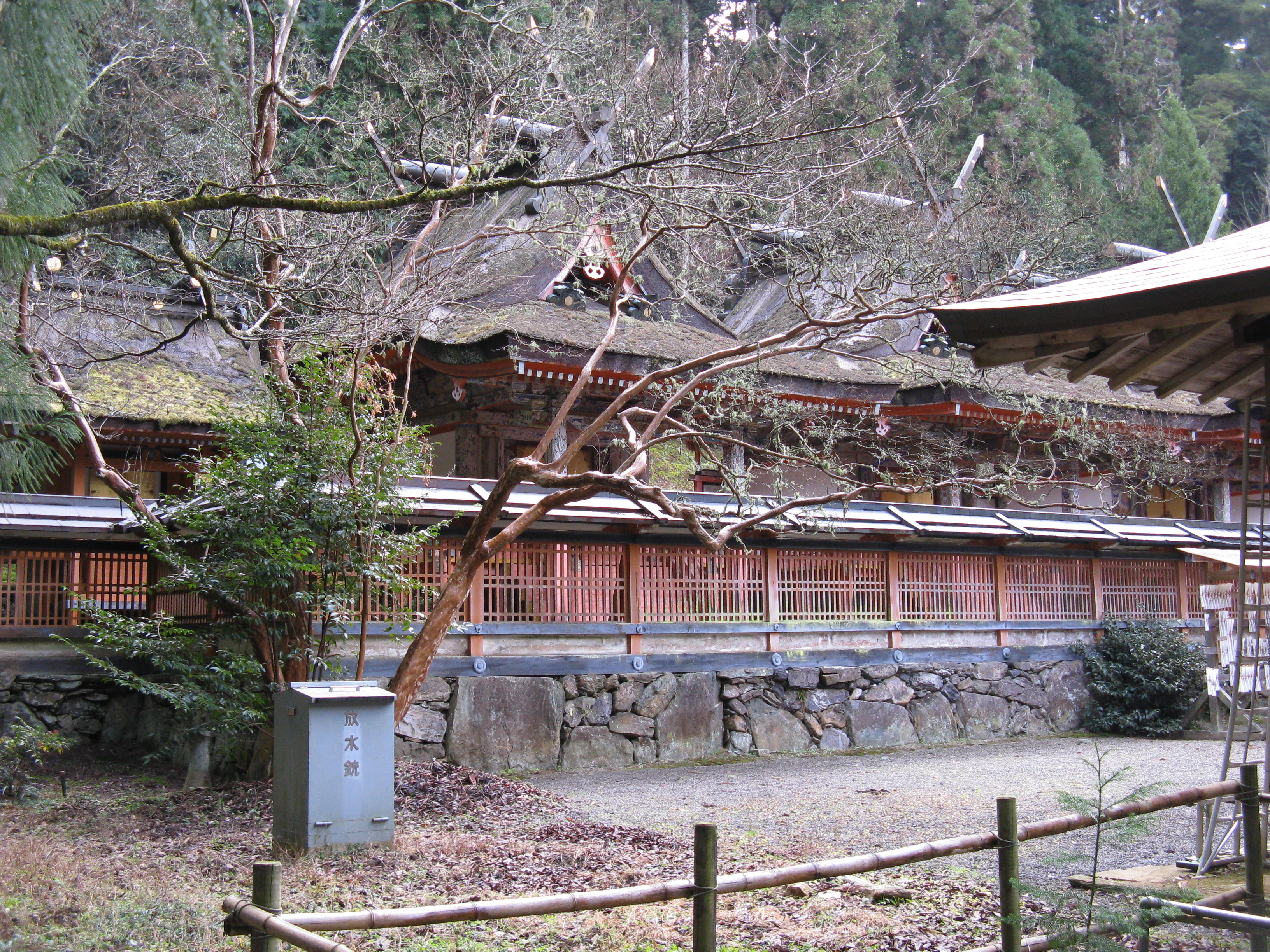 丹生都比売神社 本殿